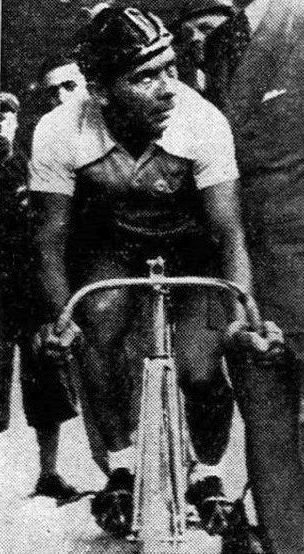 Maurice Archambaud recordman du monde de l'heure le 3 novembre 1937 à Milan, ici au départ.